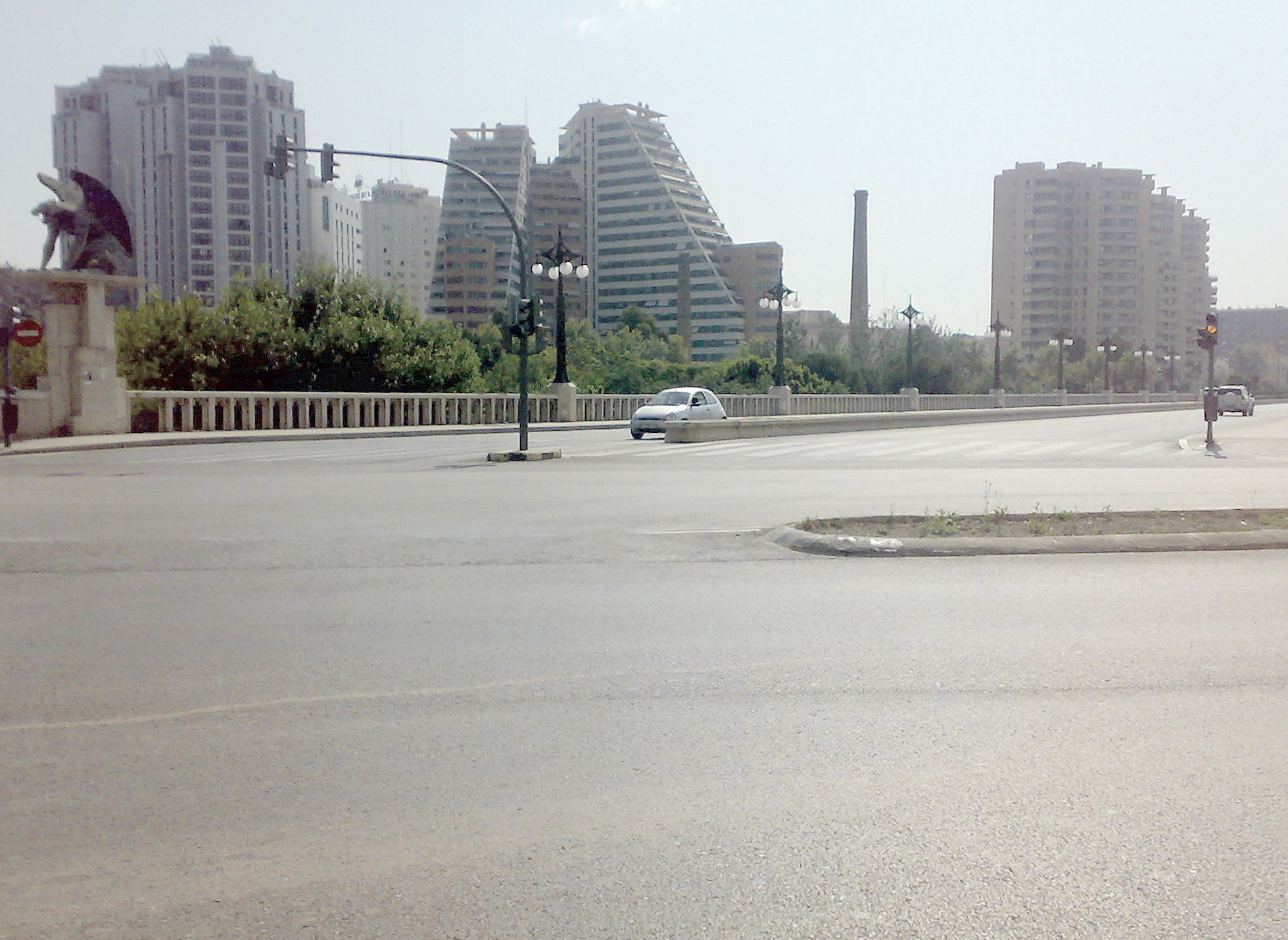 Pont del Regne de València, València (Espanya).